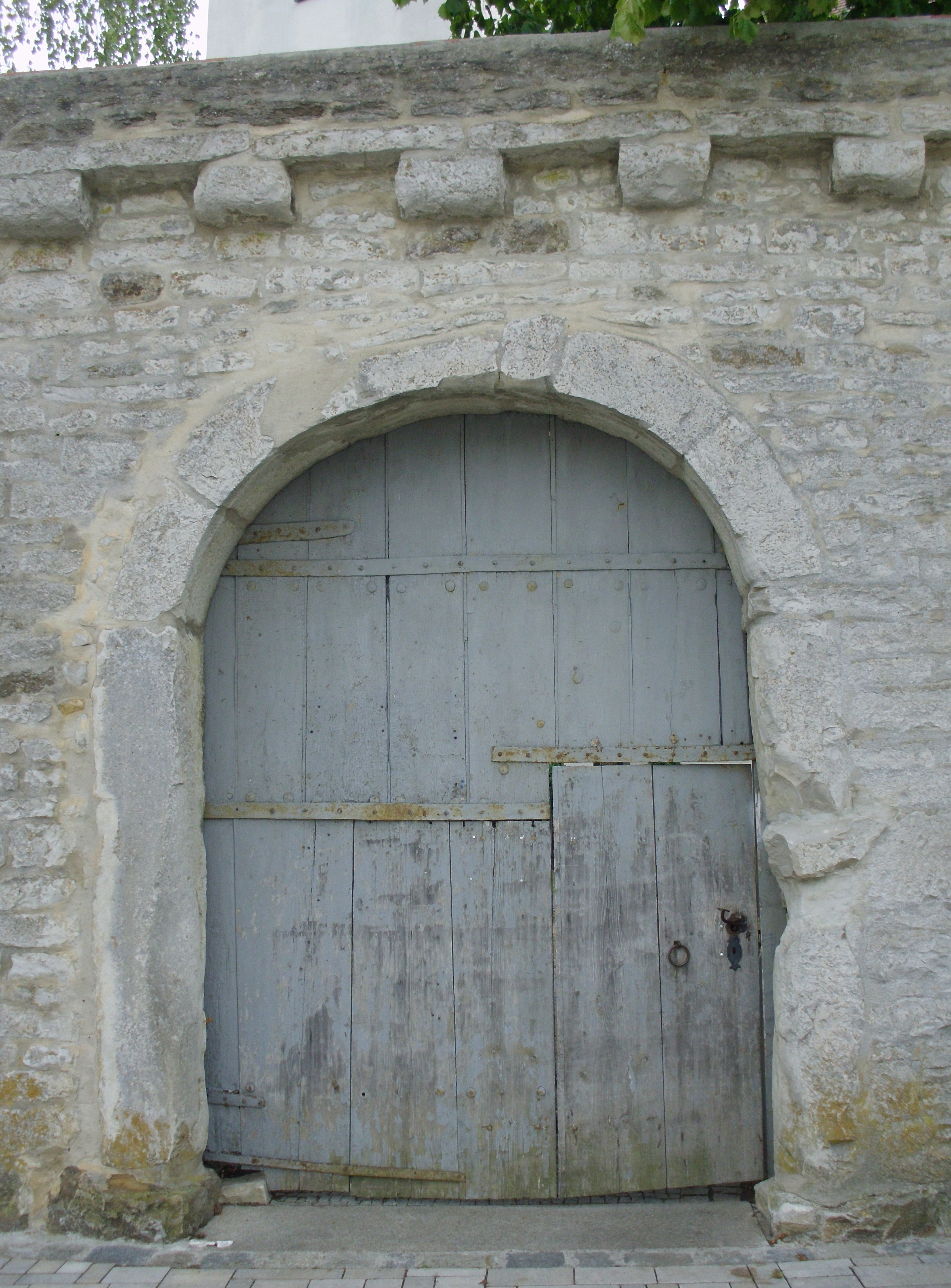 Sulzkirchen, Ortsteil von Freystadt im oberpfälzischen Landkreis Neumarkt in Bayern, Torsituation an der Friedhofsmauer